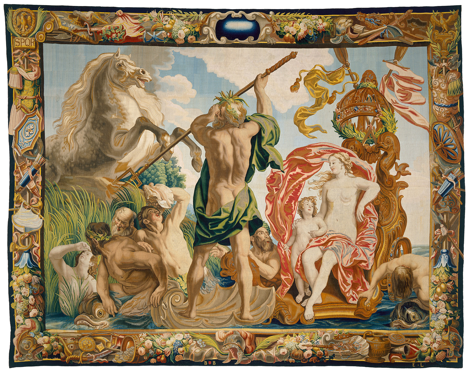 Der Reitunterricht: Neptun erschafft das Pferd. Wolle, Seide, spärliche Verwendung von Gold- und Silberfäden. Brüssel, um 1650/60.